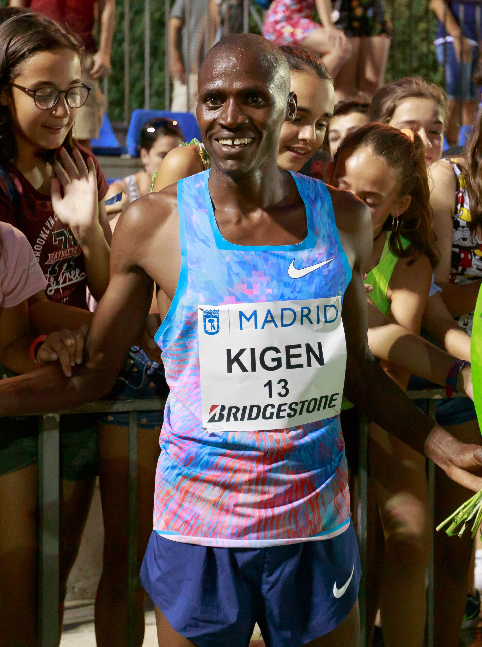 Benjamin Kigen (KEN). 1500m. IAAF World Challenge. Meeting Madrid 2017. Moratalaz, Madrid.